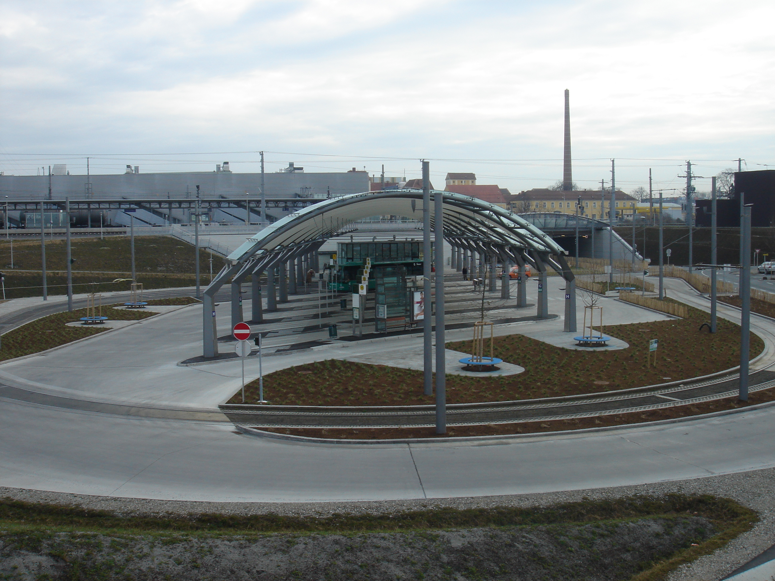 Nahverkehrsknoten Puntigam in Graz (Austria)